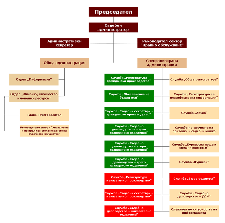 Схема на администрацията на Софийския районен съд